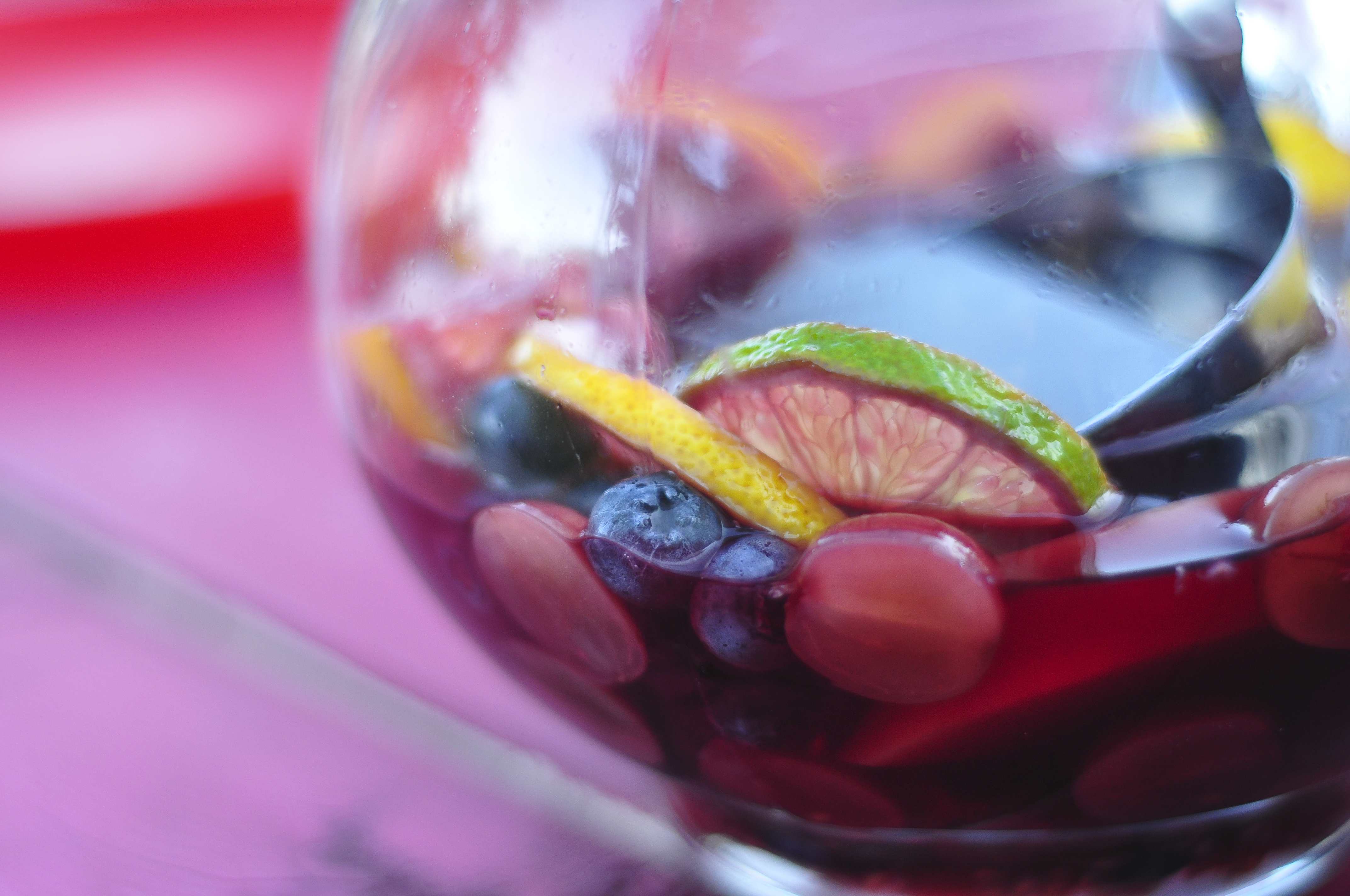 Sangria